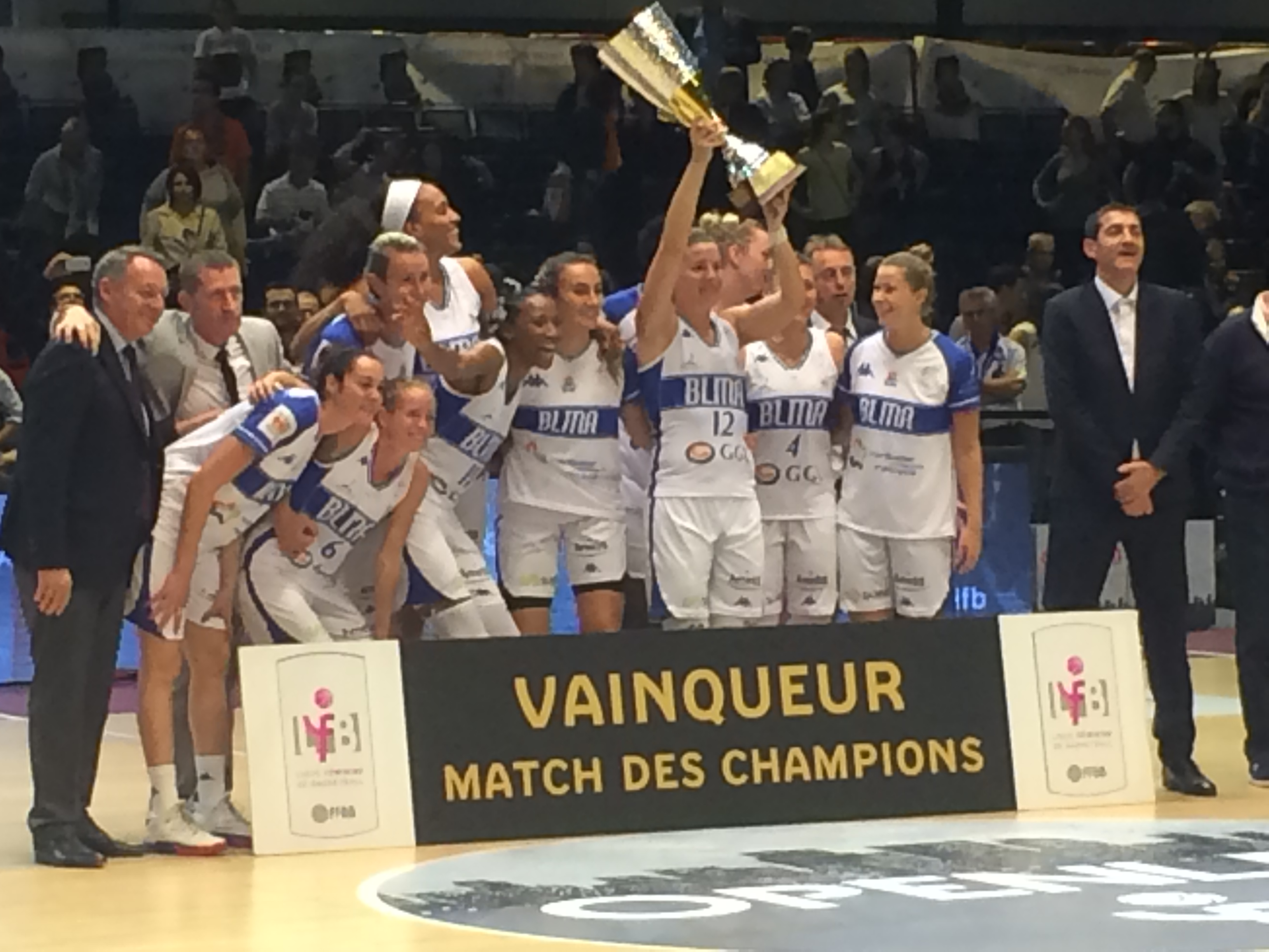 L'équipe de Basket Lattes Montpellier Agglomération brandiy le trophée du Match des Champions disputé dans le cadre de l'Open LFB